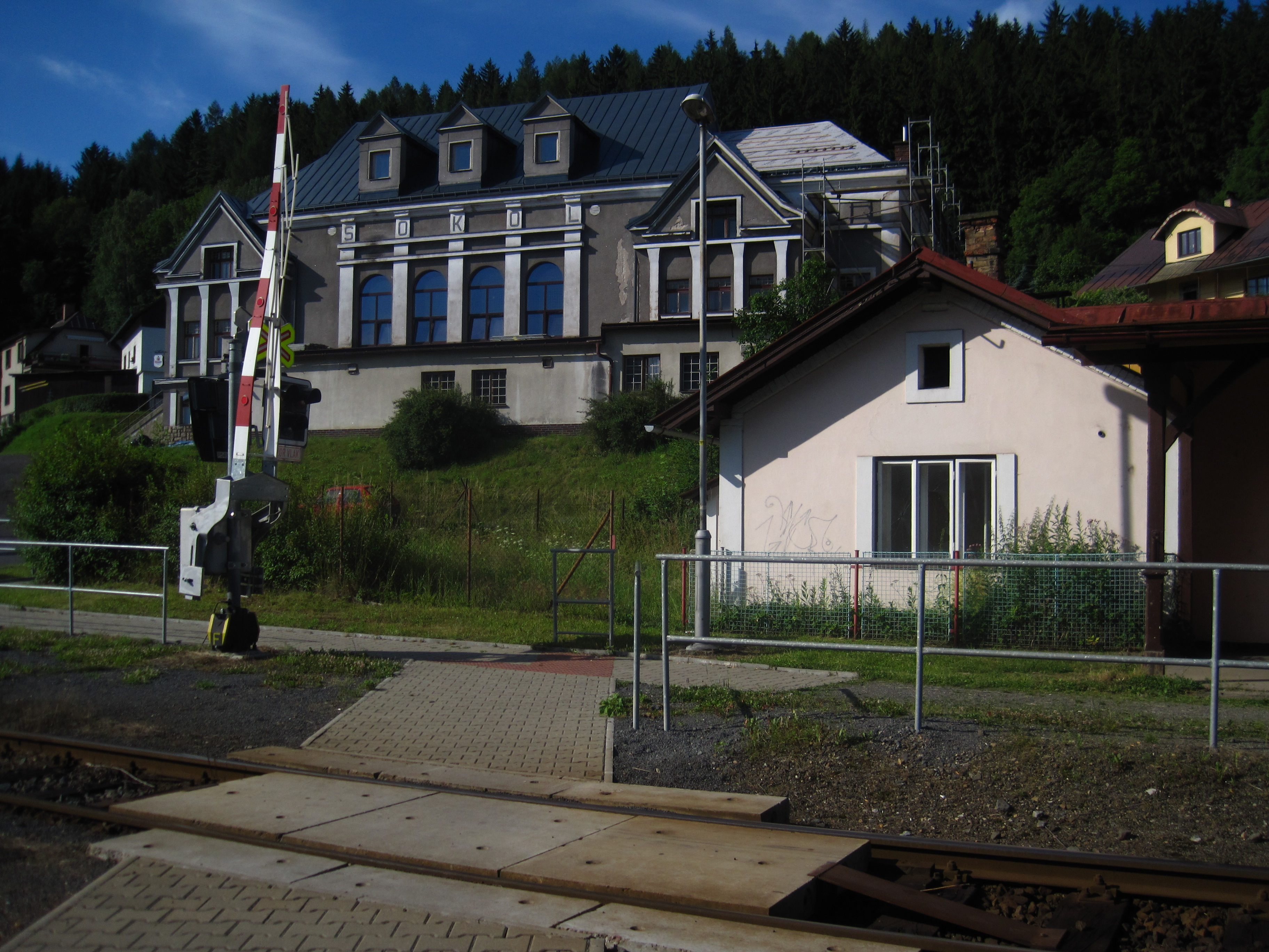 Plavy - železniční zastávka, v pozadí sokolovna čp. 140